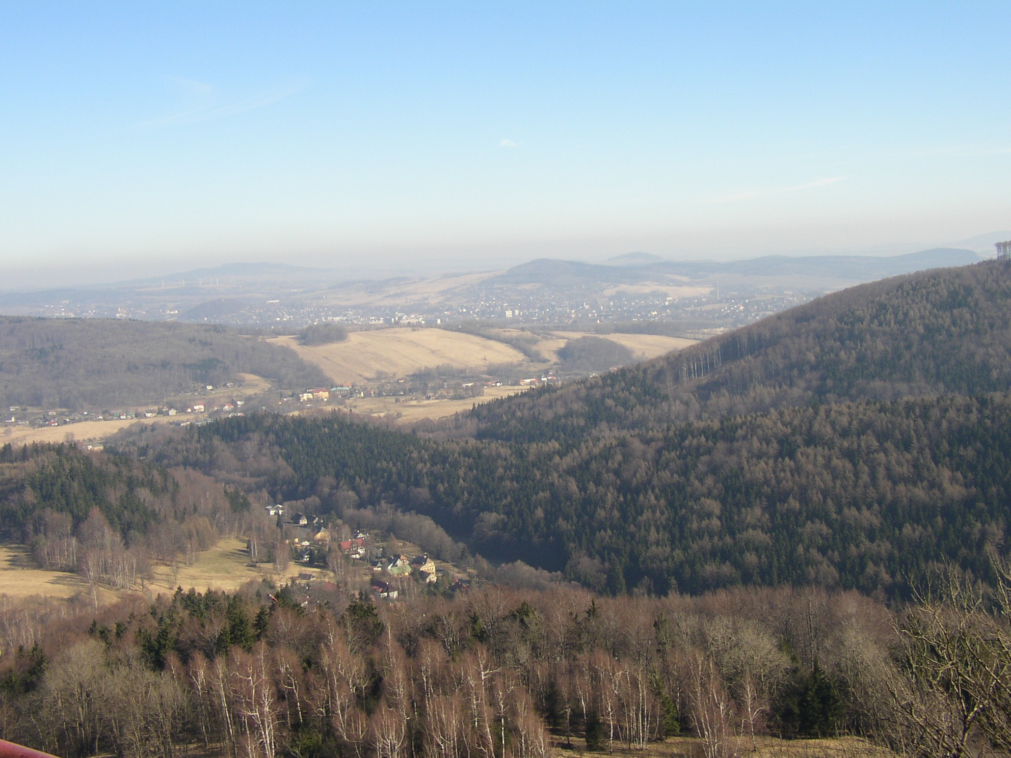 Pohled z Toštejna na osadu Lesné